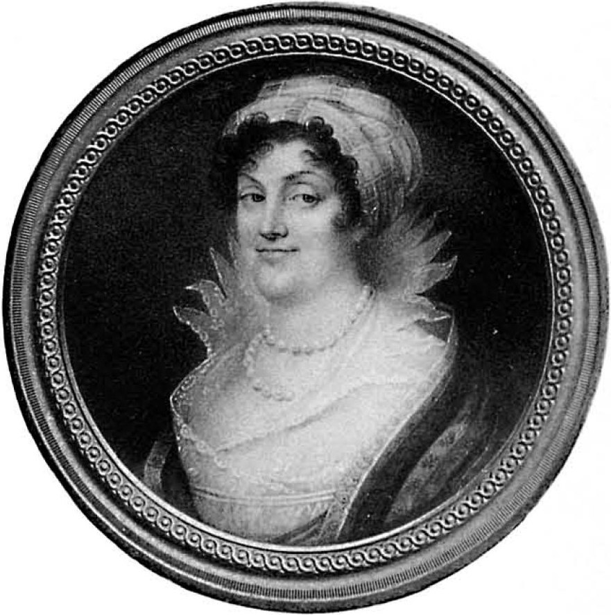 Екатерина Алексеевна Мусина-Пушкина (1754-1829)